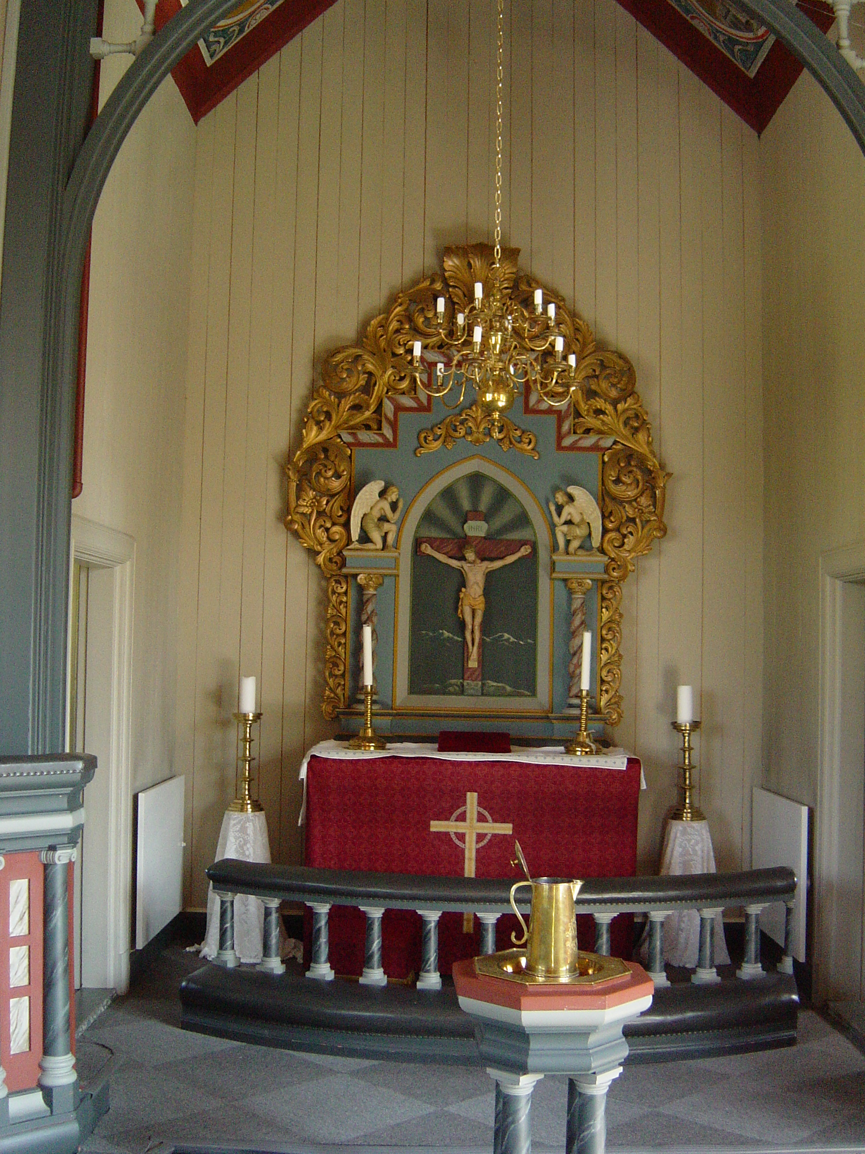 Døpefont og alter i Sollihøgda kapell. Altertavlen er fra 1936, skåret av Olav Rudi.